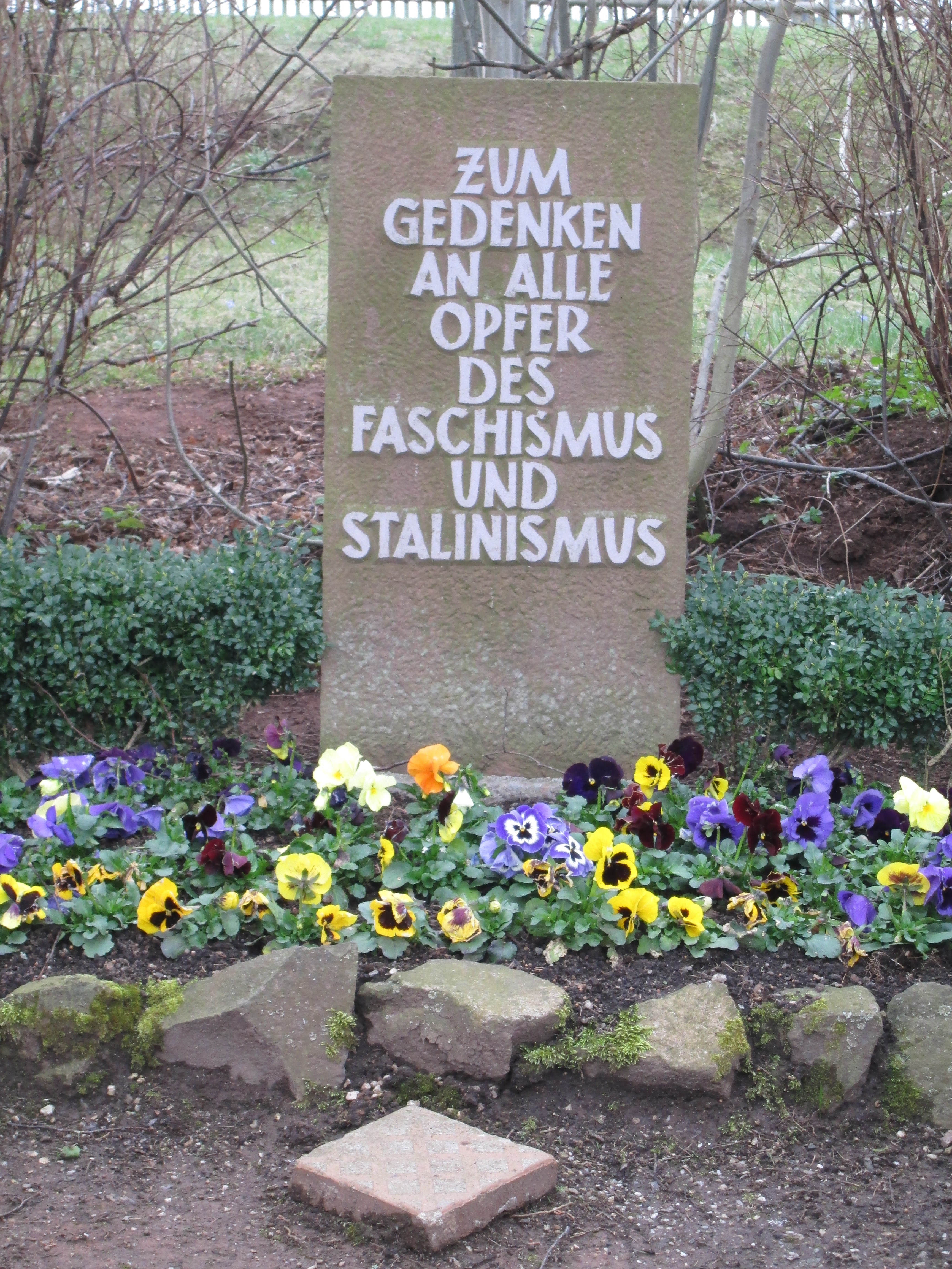 Gedenkstein für die Opfer des Nationalsozialismus in Steinpleis (Werdau, Sachsen).